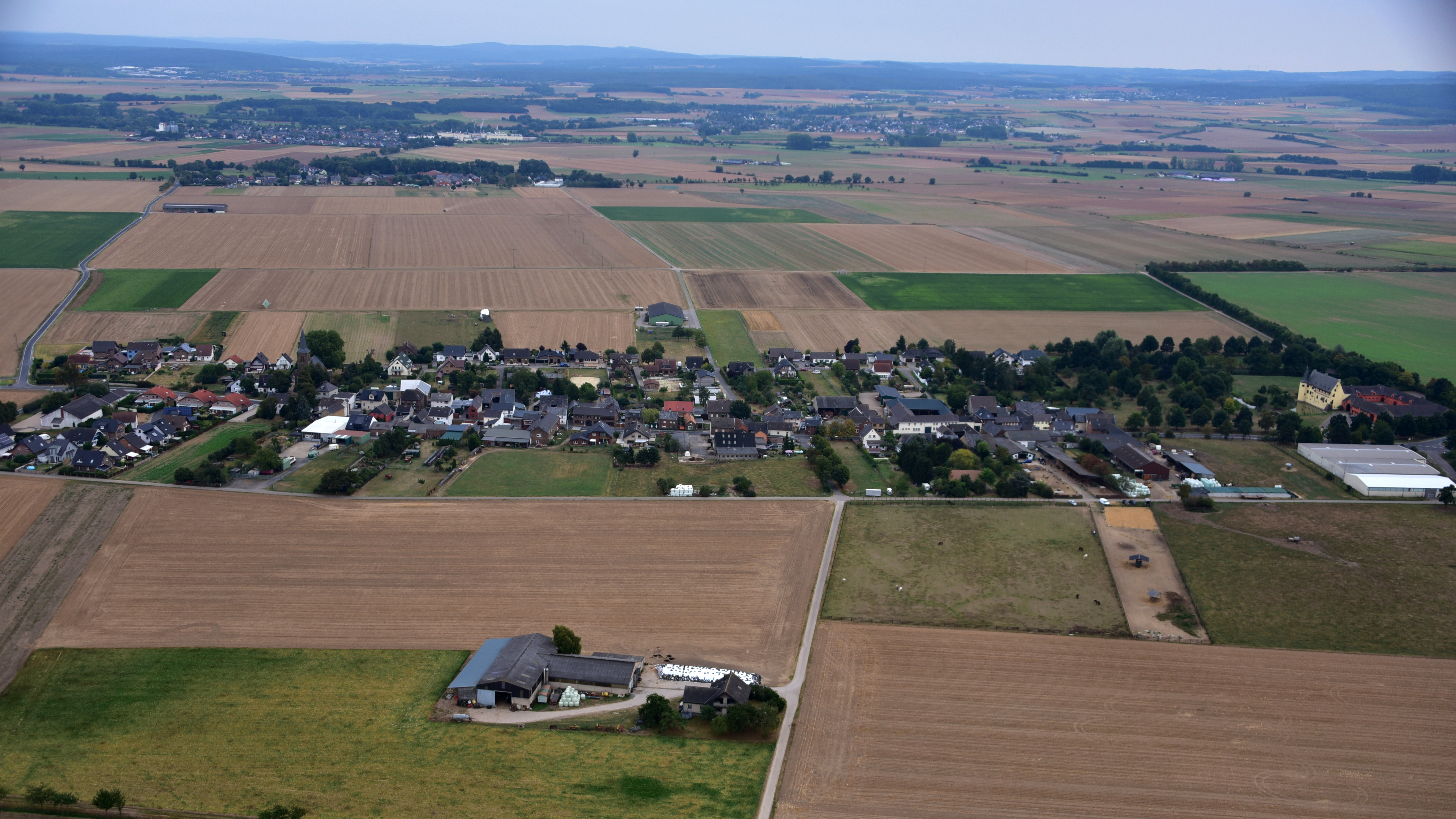 Langendorf (Zülpich), rechts Burg Langendorf, Luftaufnahme (2016)